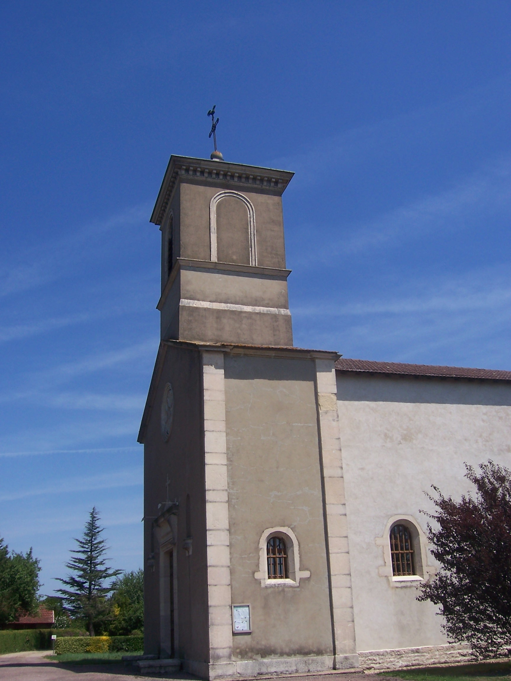 Eglise de Saint-Didier-en-Bresse